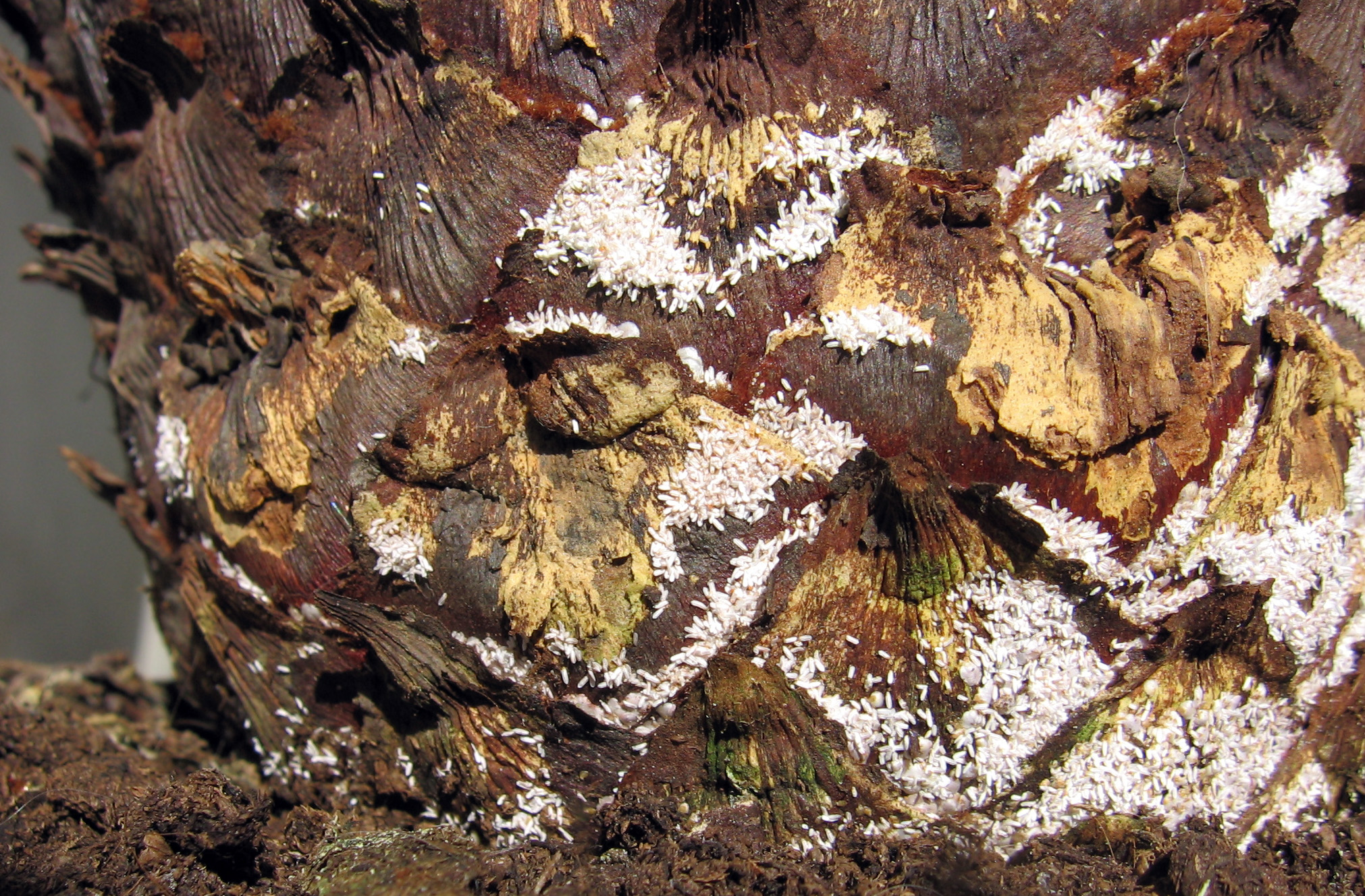 Cykas zaatakowany grzybami Autorem zdjęcia jest Skok.